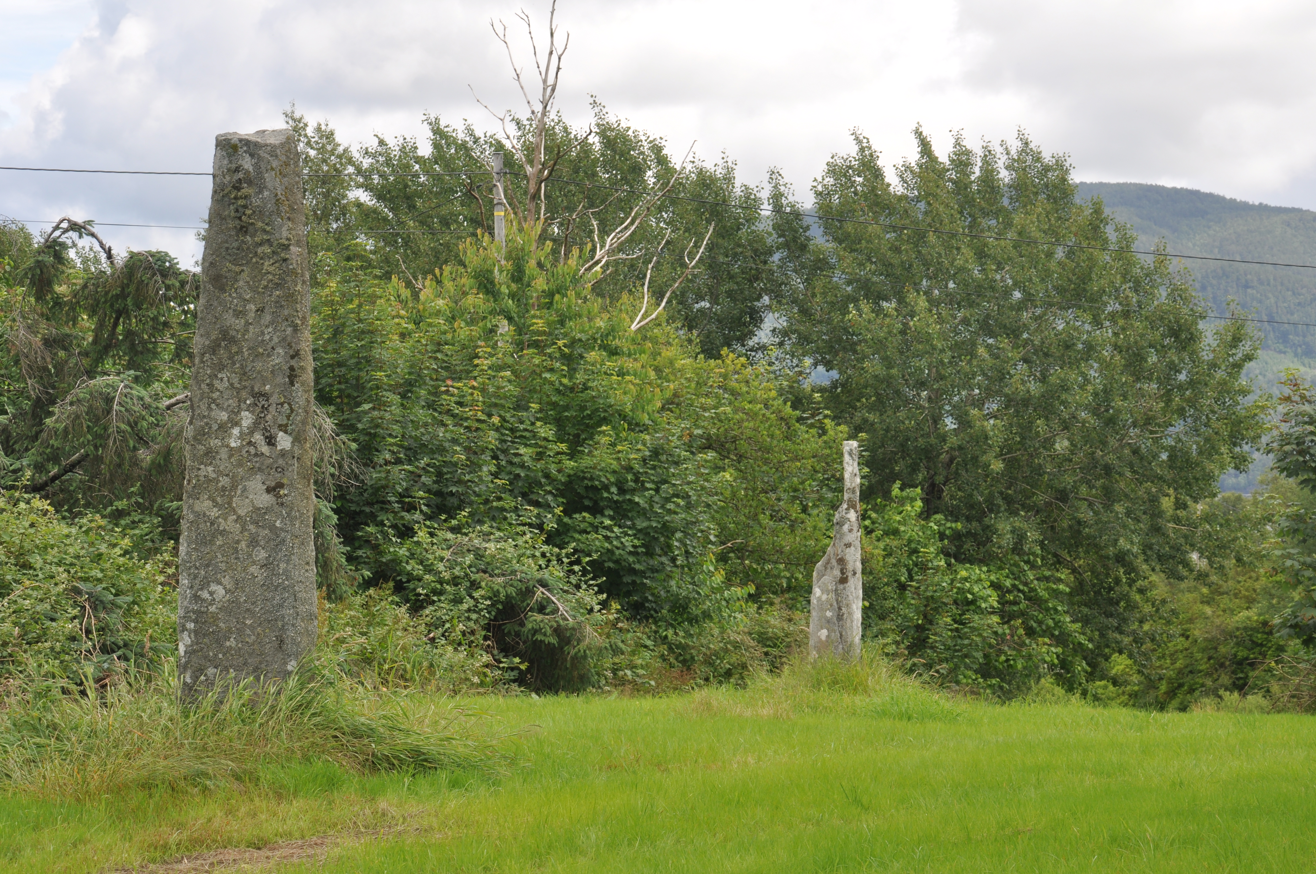 Kjempesverda. Bautasteiner på Foldøy